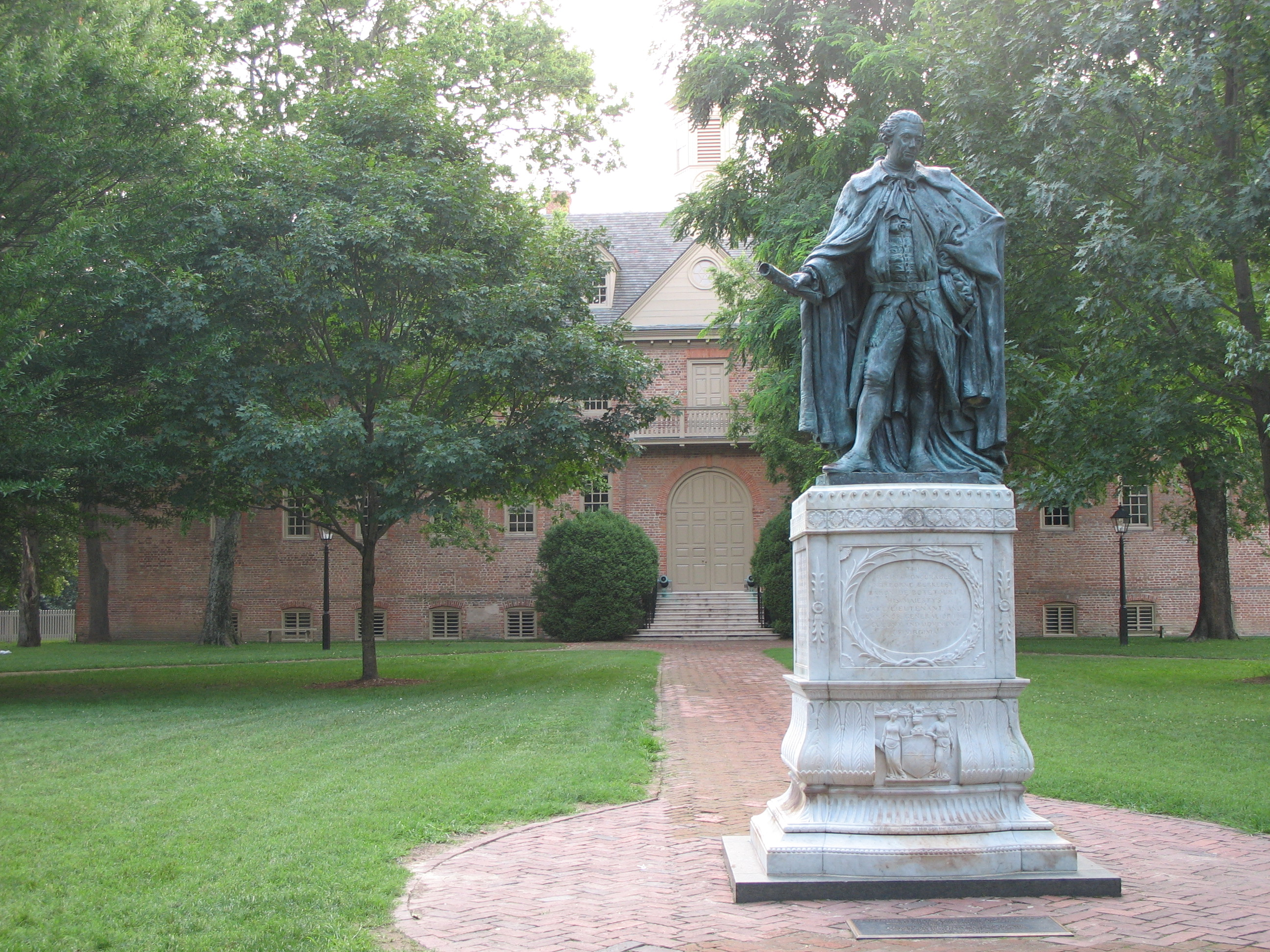 College of William and Mary in Williamsburg (Virginia) statue of Norborne Berkeley ? sculptor unknown, date unknown